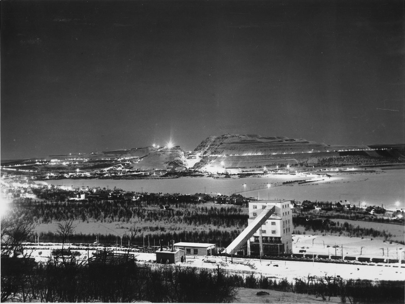 A6141 Kiirunavaara i månsken.